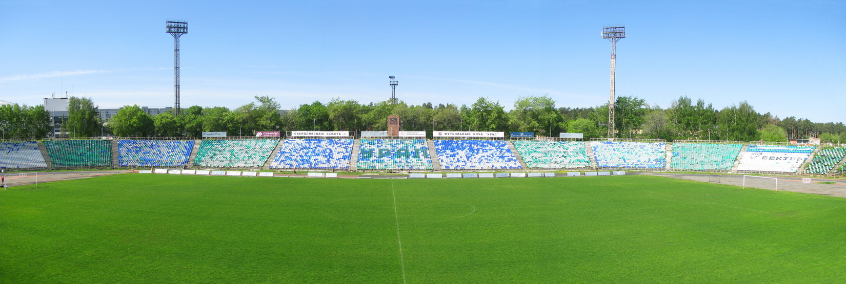 Стадион "Уралмаш" в г. Екатеринбурге перед закрытием на реконструкцию в 2013 году.